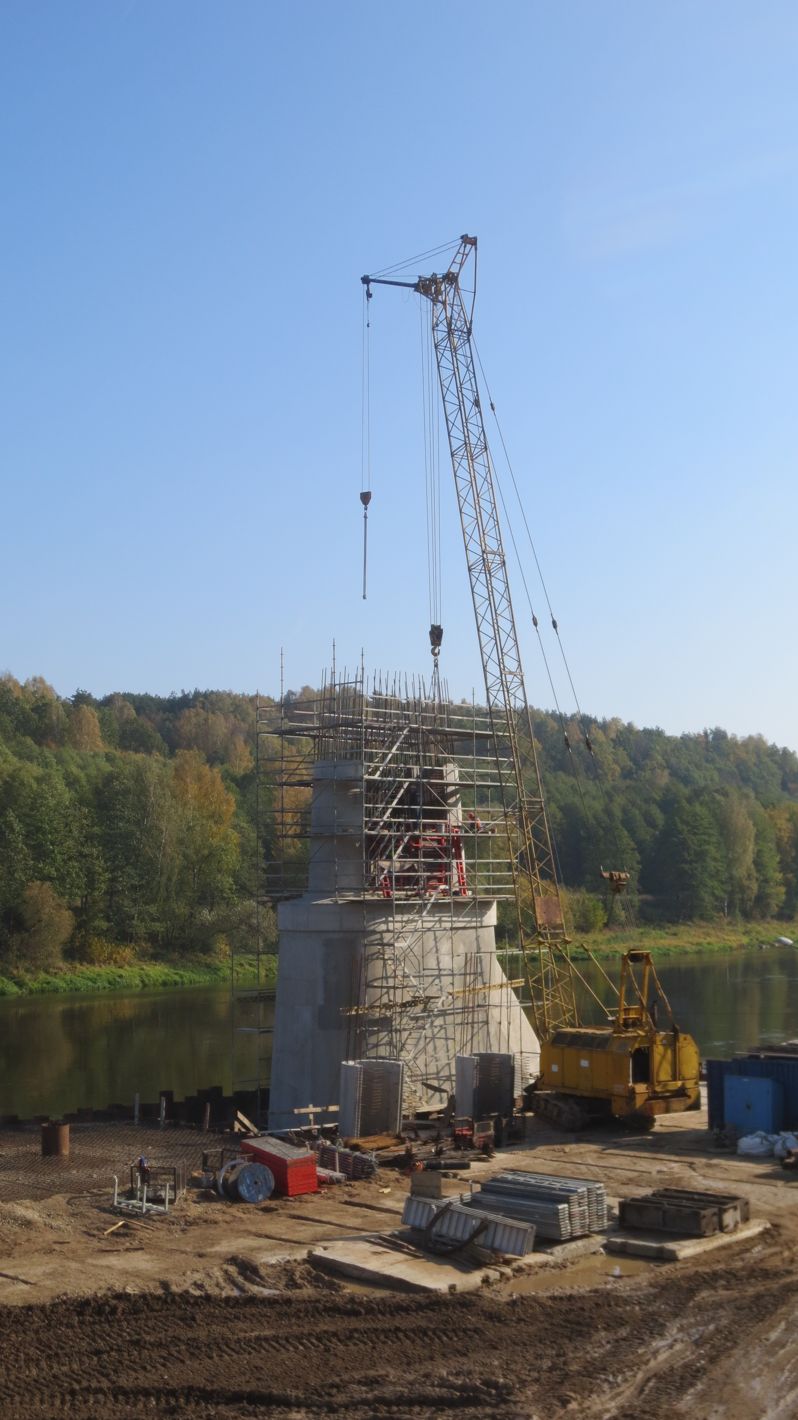 Kairiojo tauro kolonos įrengimas